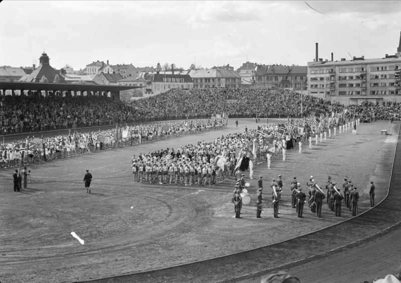 Opening ceremony for Holmenkollstafetten at Bislett stadion in Oslo, Norway